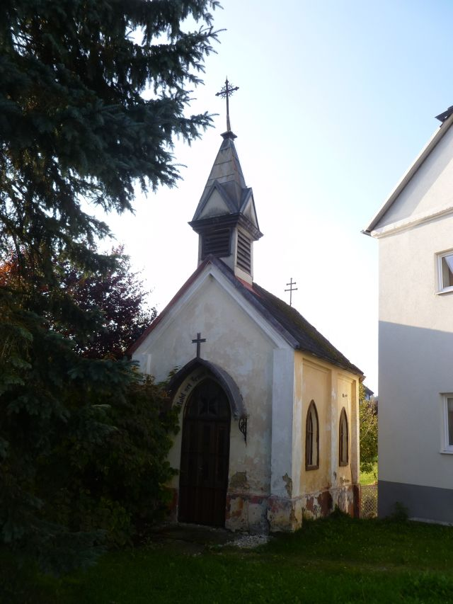 Schloss Leombach-Schlosskapell